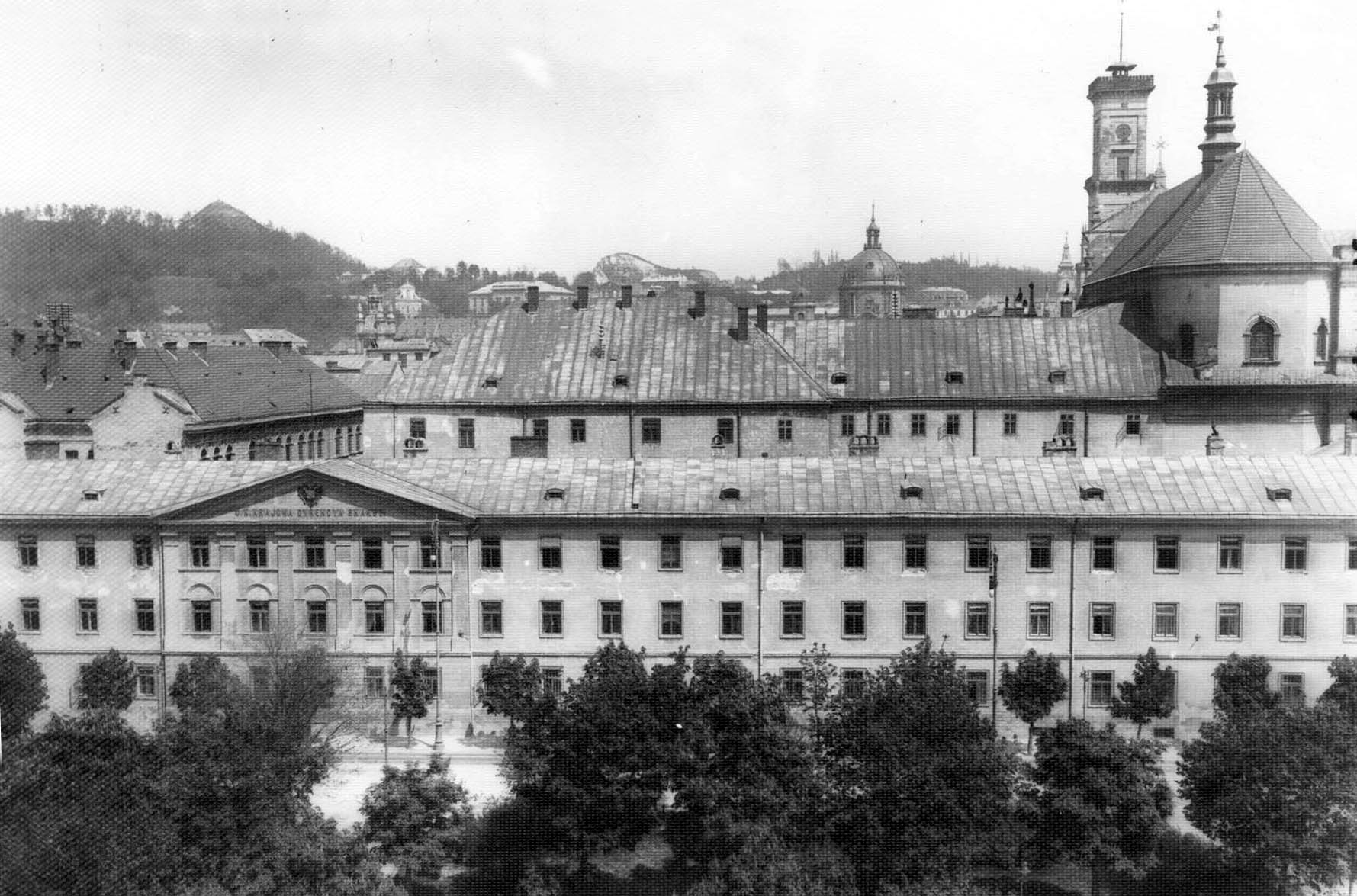 Адміністративні будівлі на проспекті Cвободи, розібрані у 1943-1947 роках.